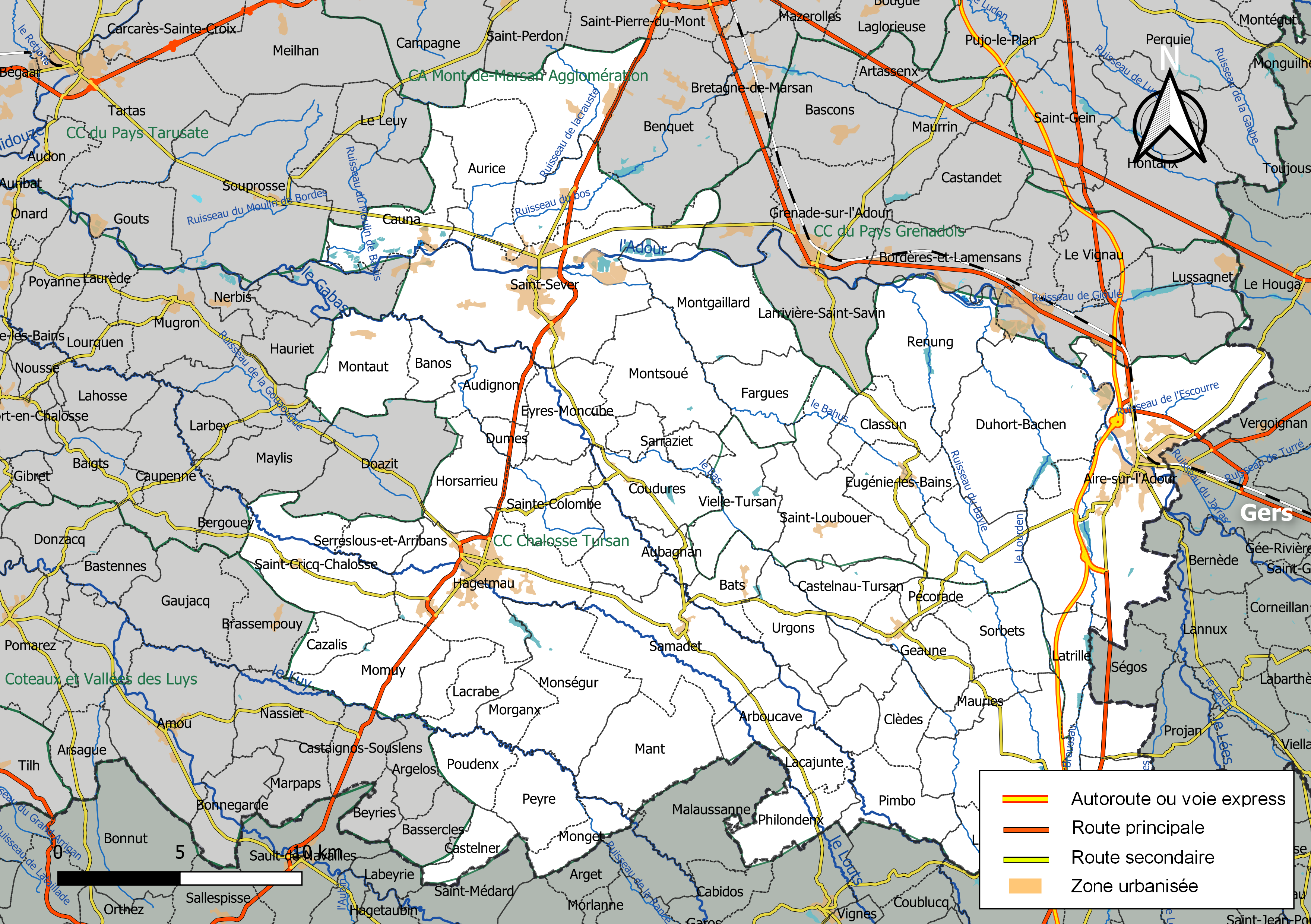 Carte géographique de la Communauté de communes Chalosse Tursan, département des Landes, France. Composition au 1er janvier 2019.